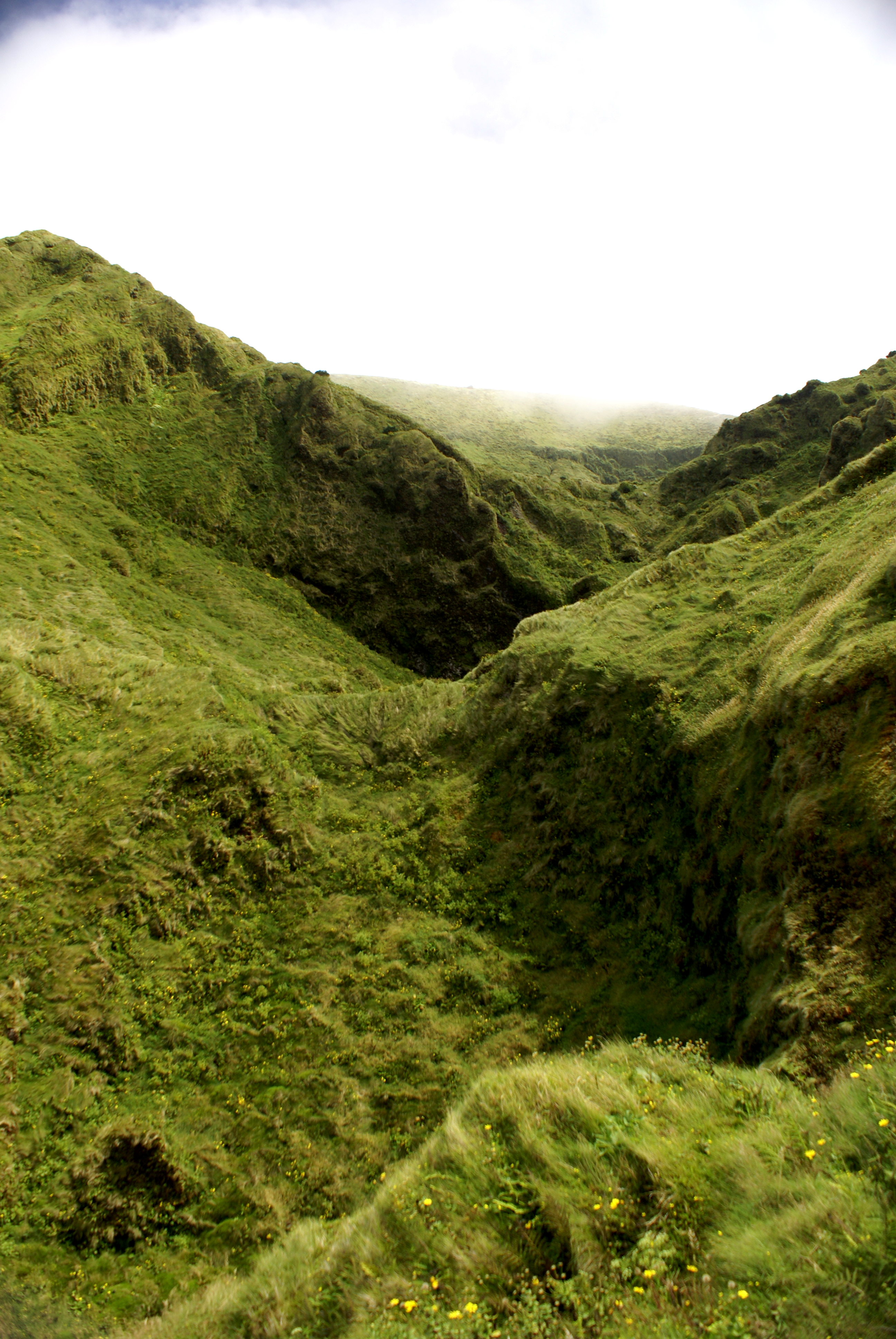 Inicio das formações geológicas do Algar do Montoso, Norte Grande, Calheta, ilha de São Jorge, Açores